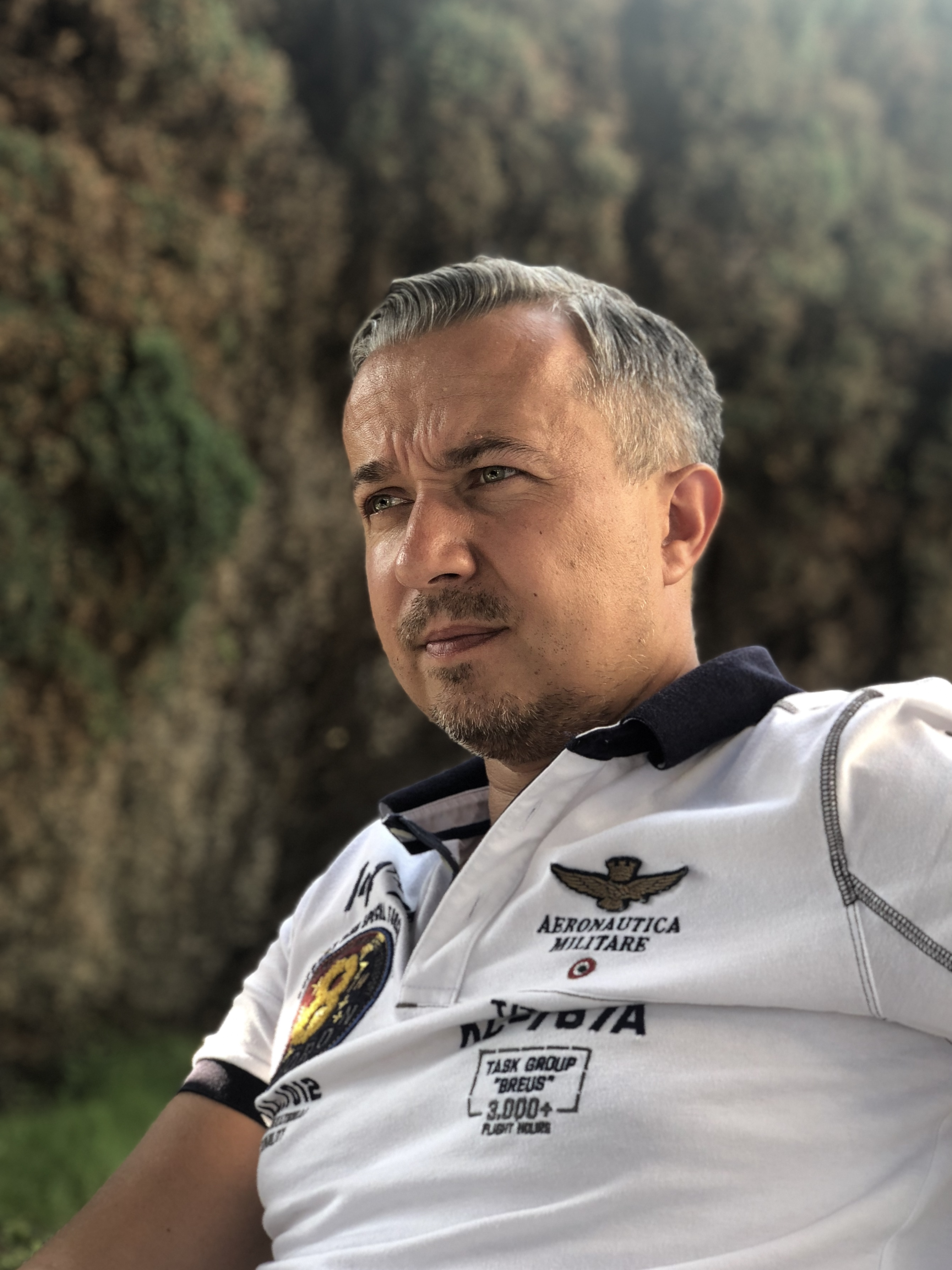 Dukszta Tomasz